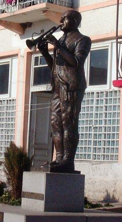 Споменик Бакији Бакићу. Аутор: Немања Тодоровић, Београд.